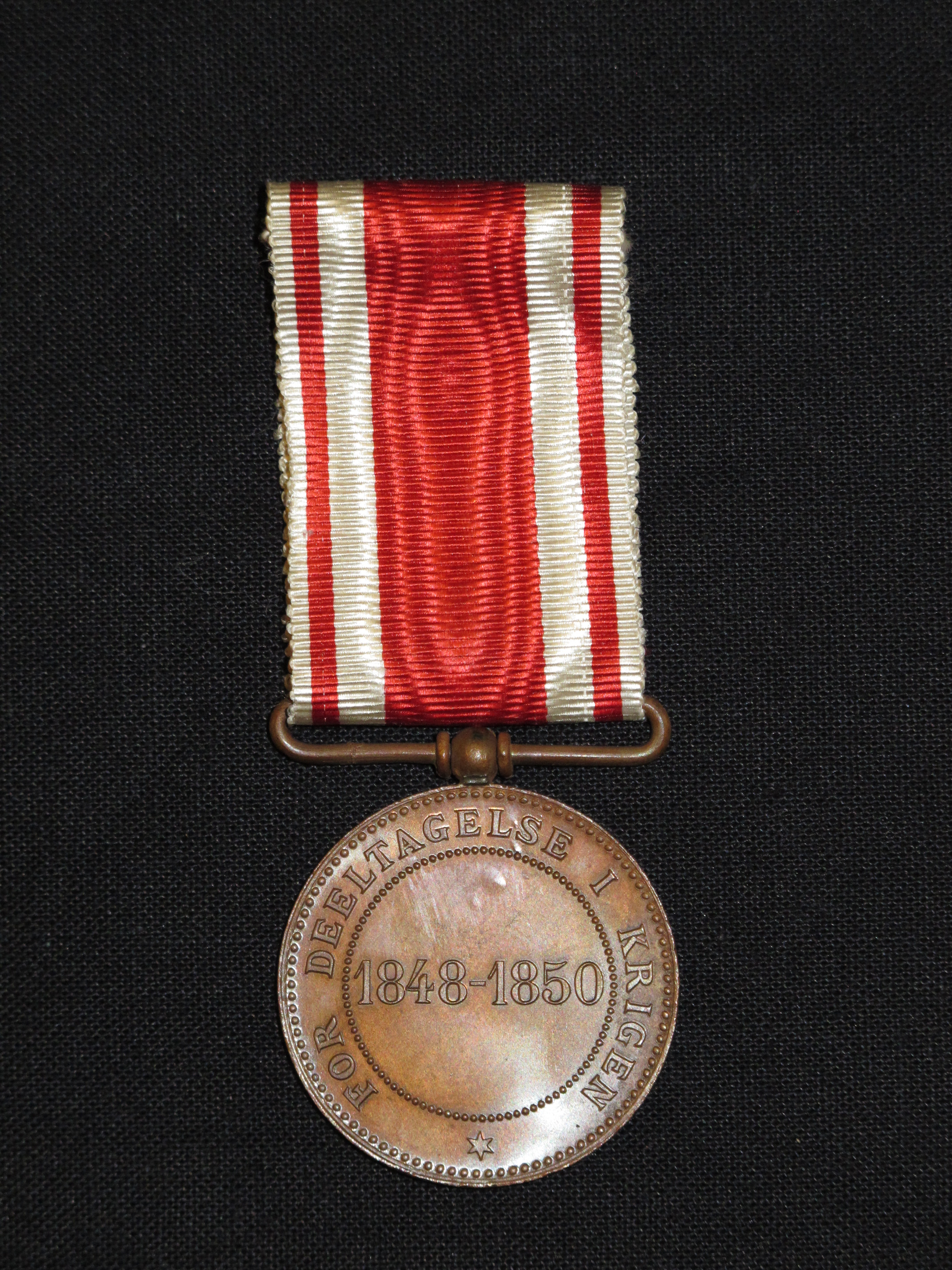 Erindringsmedalje for krigsdeltagelse i krigen 1848-50, også kendt som treårskrigen.